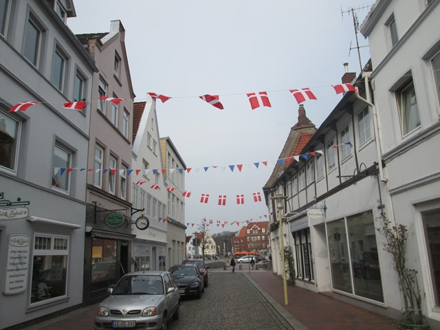 Fähnchen in der Altstadt von Glückstadt / Holstein in den dänischen und schleswig-holsteinischen Farben.